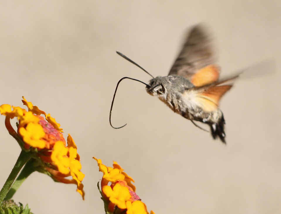 Le Sphinx du caille-lait (Macroglossum stellatarum L.) ou Sphinx colibri ou encore Moro Sphinx possède une très longue trompe pour butiner les fleurs en vol stationnaire comme les oiseaux-mouches. Il butine généralement le nectar des fleurs que les autres insectes ne peuvent atteindre. Son vol est d'une précision et d'une rapidité peu communes. Cet insecte migrateur, peut se rencontrer presque partout dans l'hémisphère nord en été, mais il réside uniquement dans les climats tempérés les plus chauds (Espagne, Portugal, Italie, Turquie, Afrique du Nord).